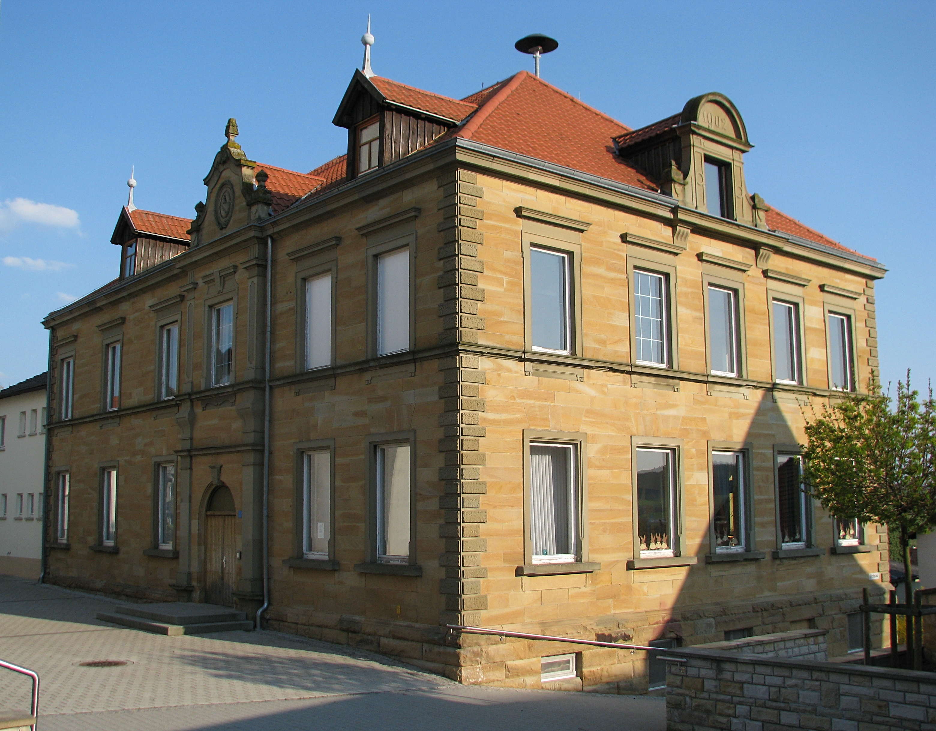 Schulhaus in Wülfershausen an der Saale, 1902